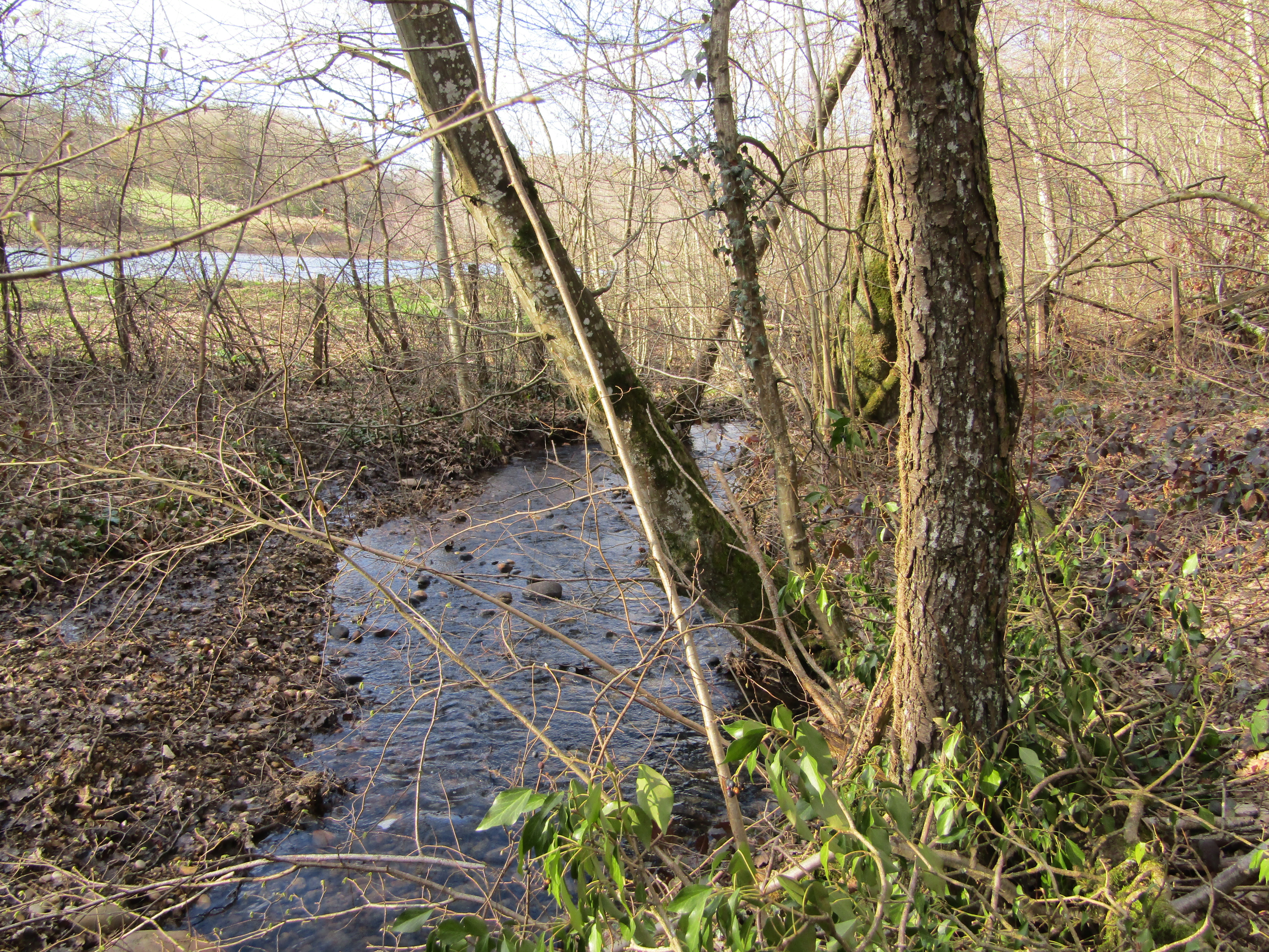 Forêt de Bonnevaux, secteur de Commelle en mars 2019